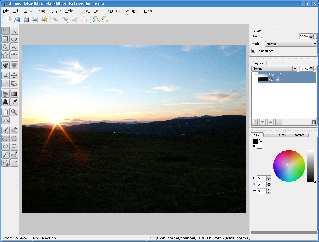 Skärmdump av Krita 1.6